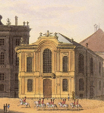 Ausschnitt aus einer Darstellung des Michaelerplatzes: Hoftheater nächst der Burg